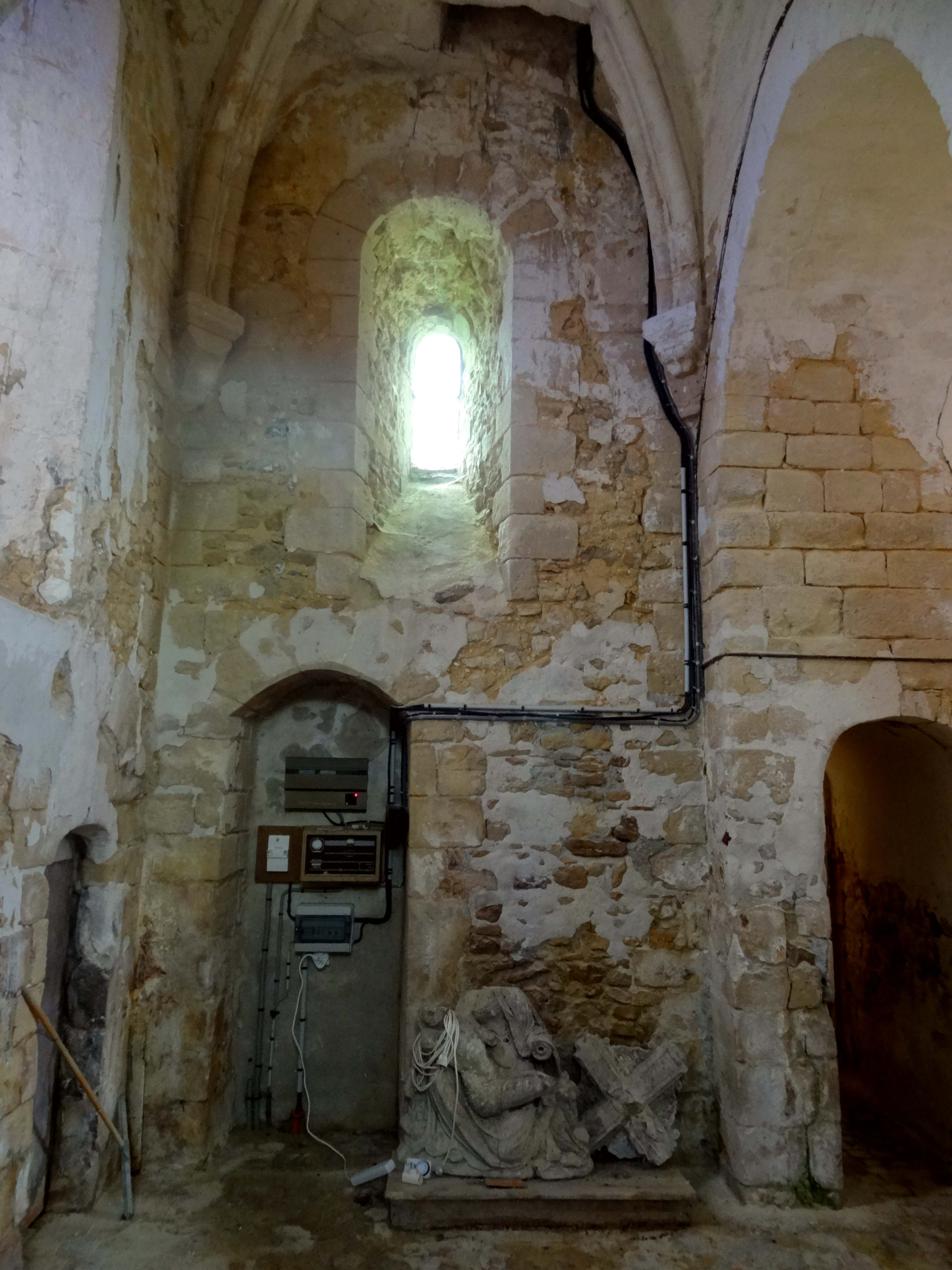 Intérieur de l'église - voir titre.